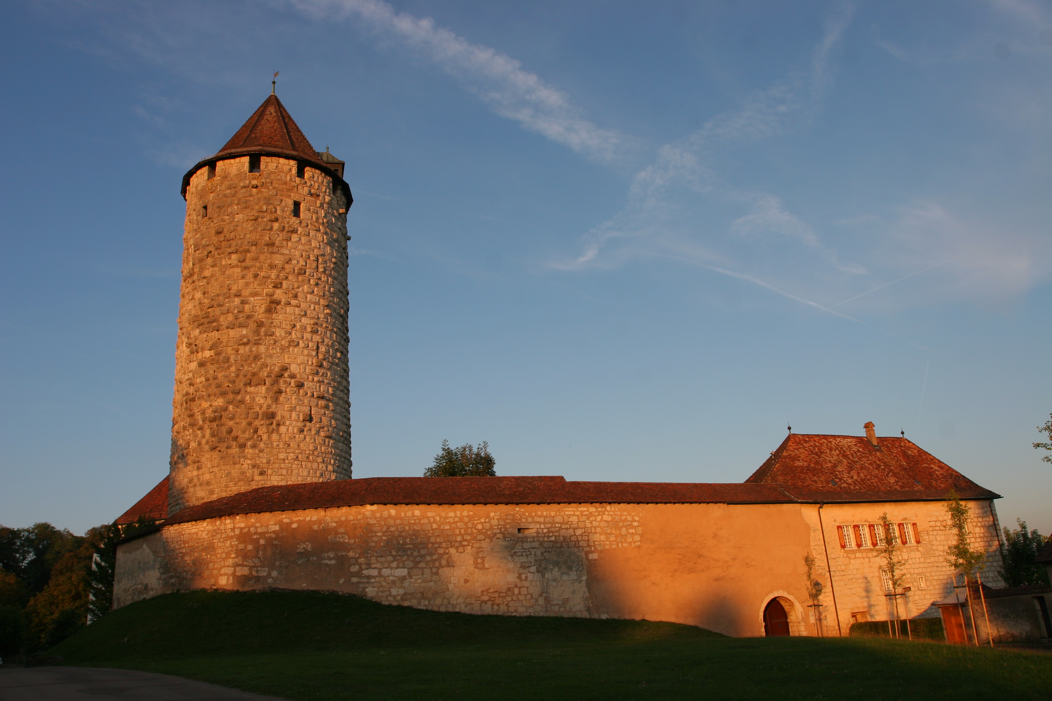 Tour Réfous